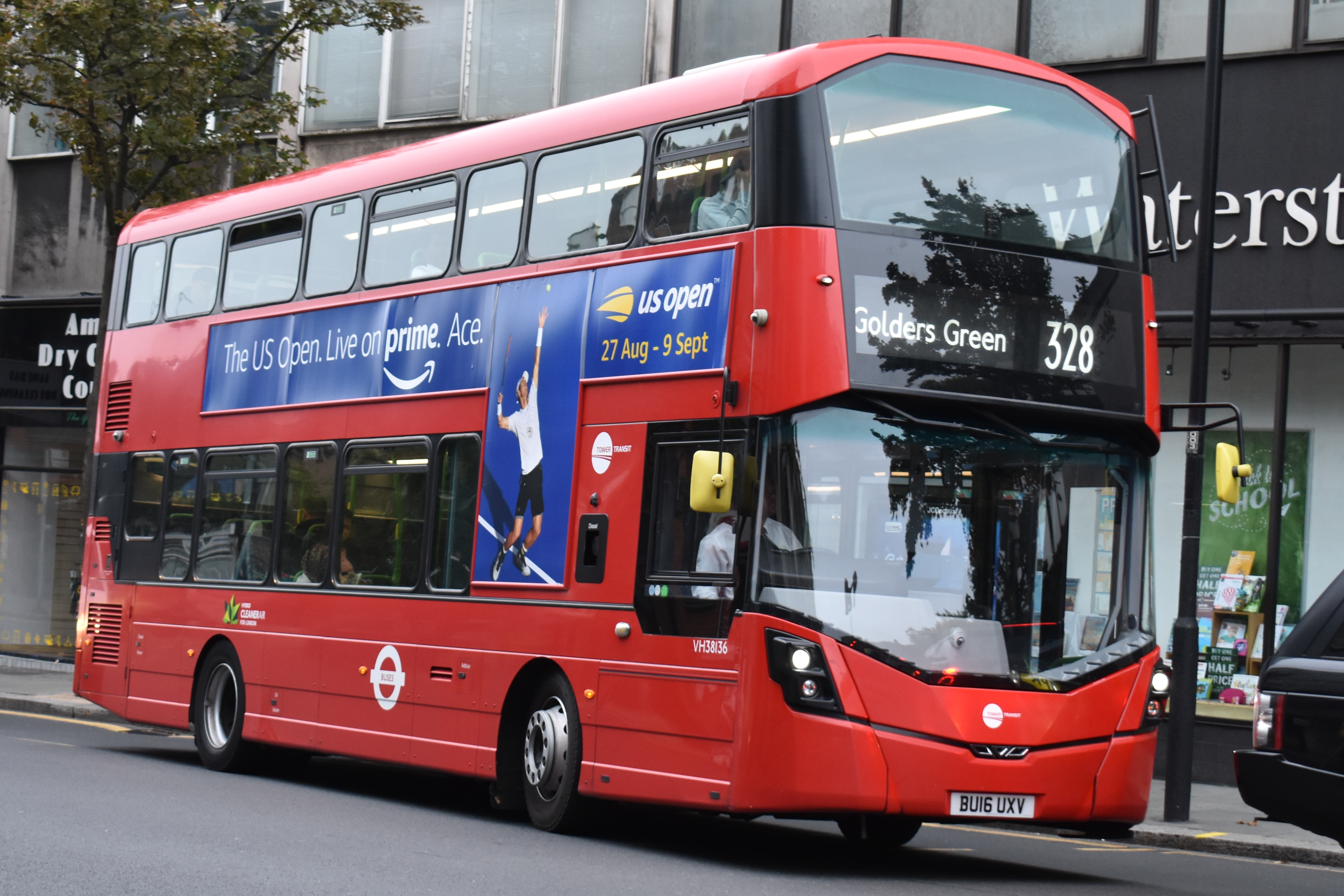 VH38136 - BU16 UXV Volvo B5LH Wright Eclipse Gemini 3 seen in Kensington Church Road.